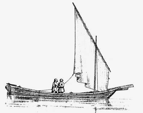 Рыбница